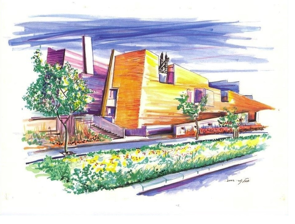 בית הפלמ"ח בתל אביב ציור של הצייר שאול נמרי